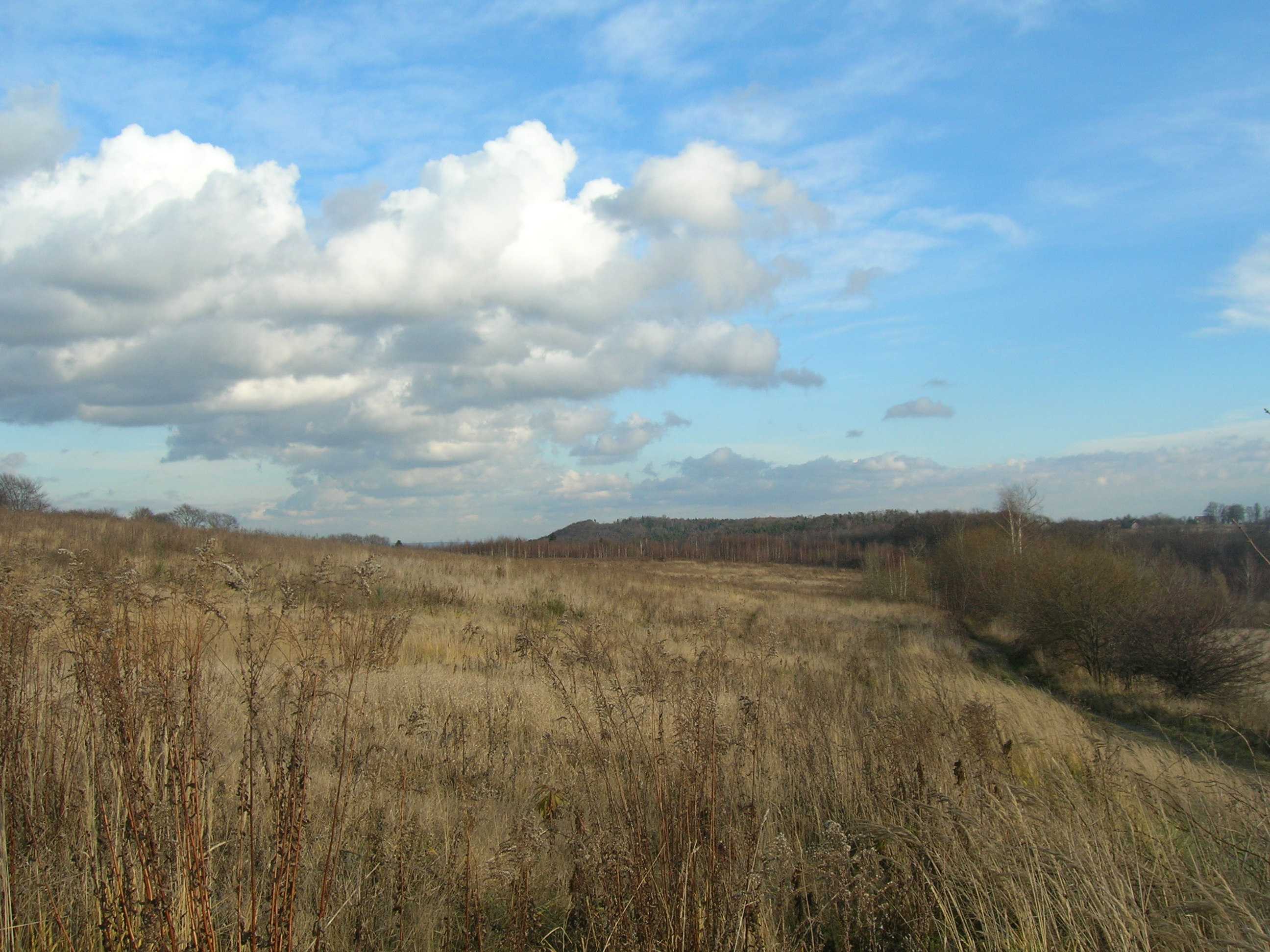 Chełm.Szczyt